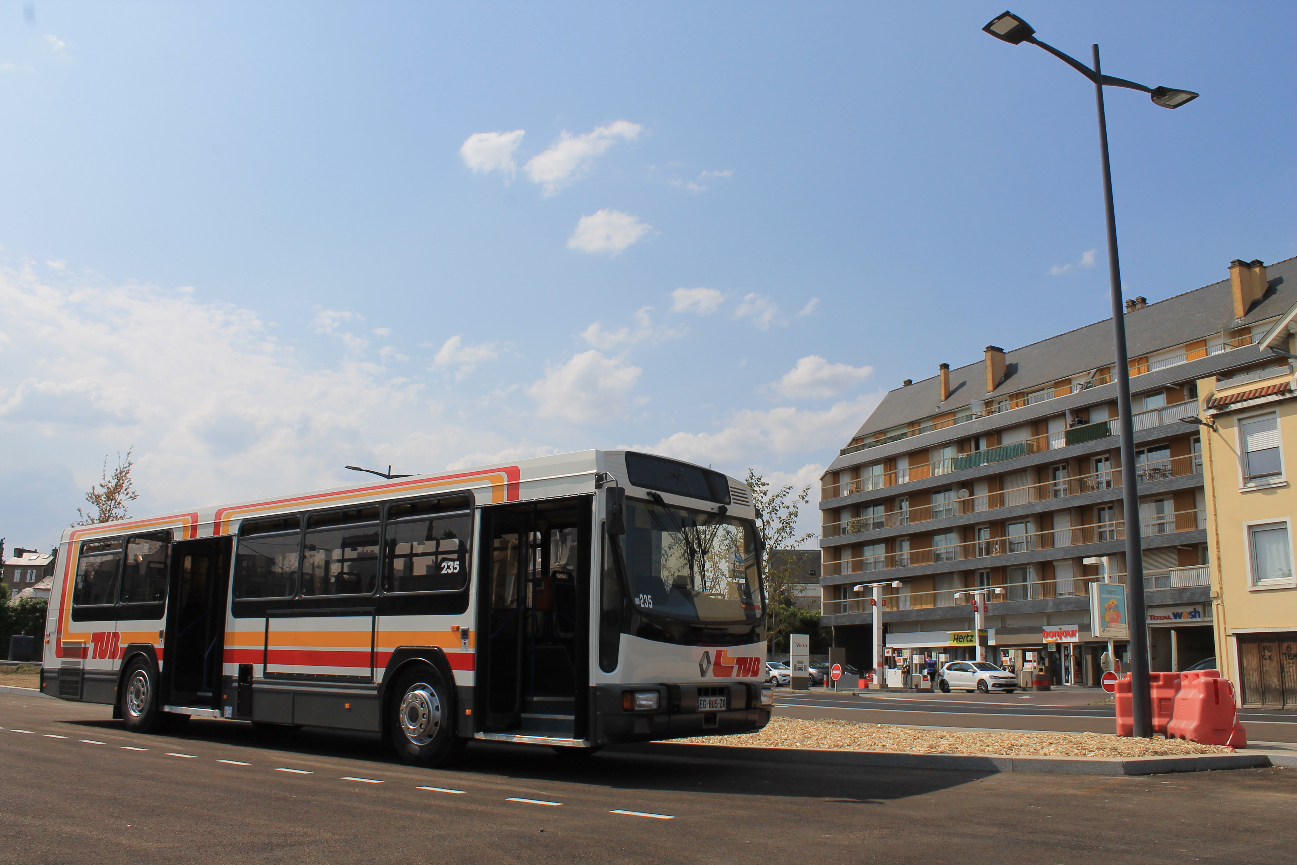 Renault PR 100.2 n°235 - HistoTUB - restauré